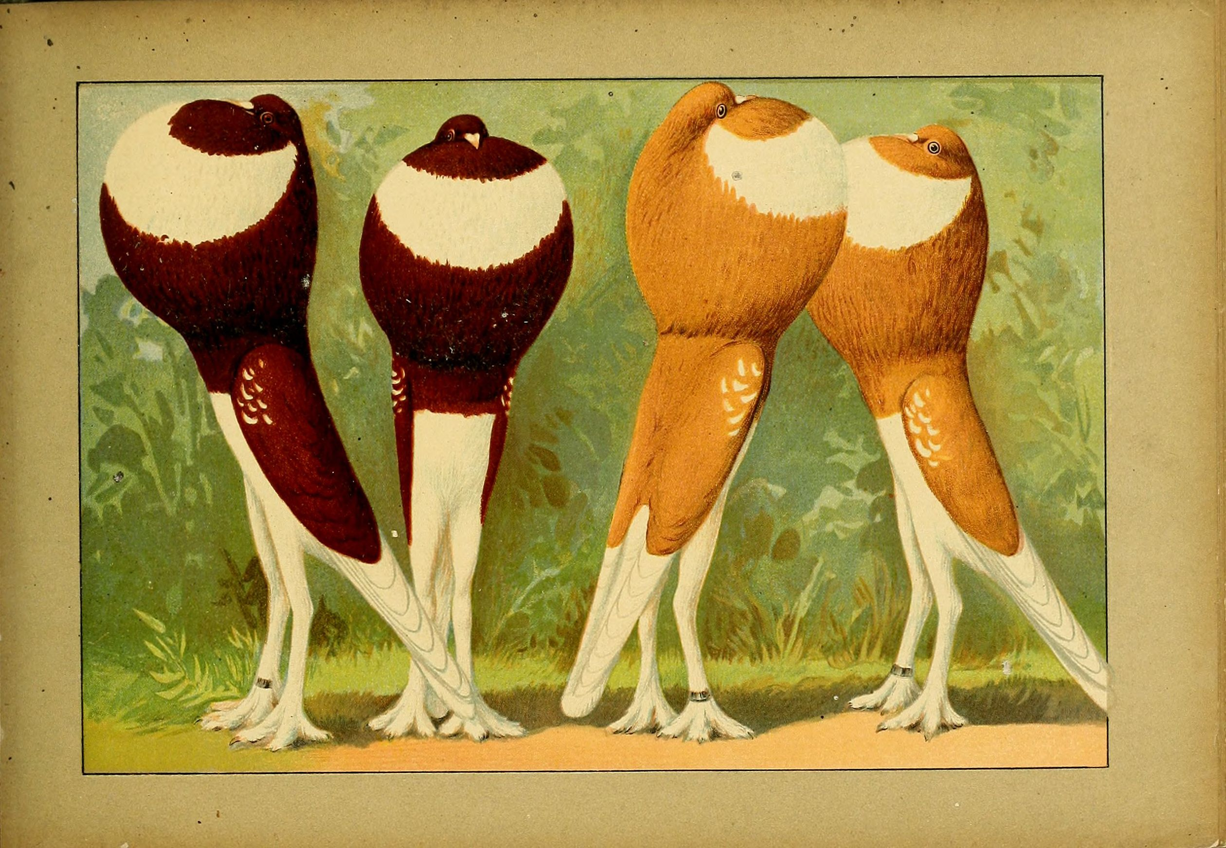 Deutsch